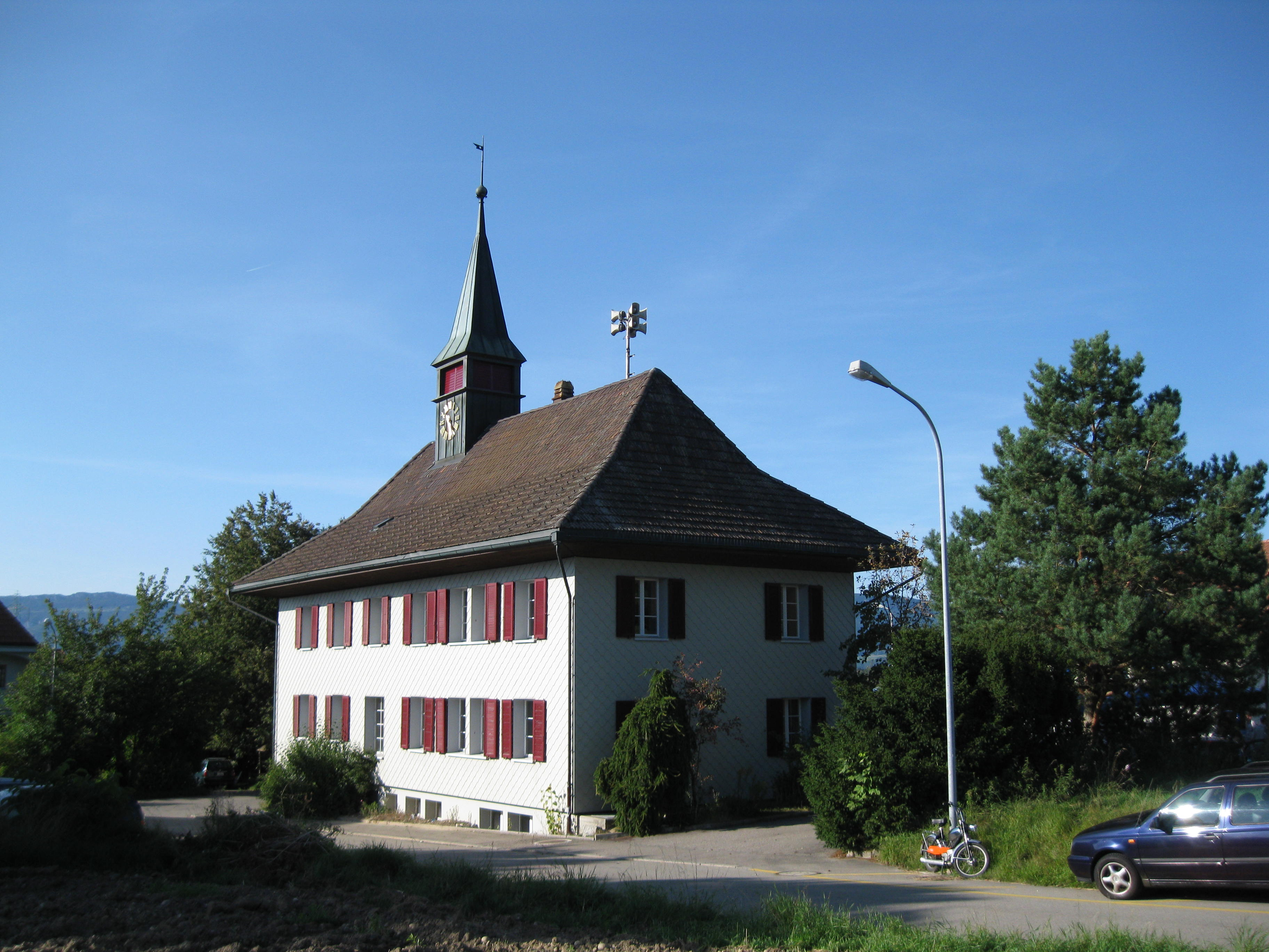 Schulhaus Bolken